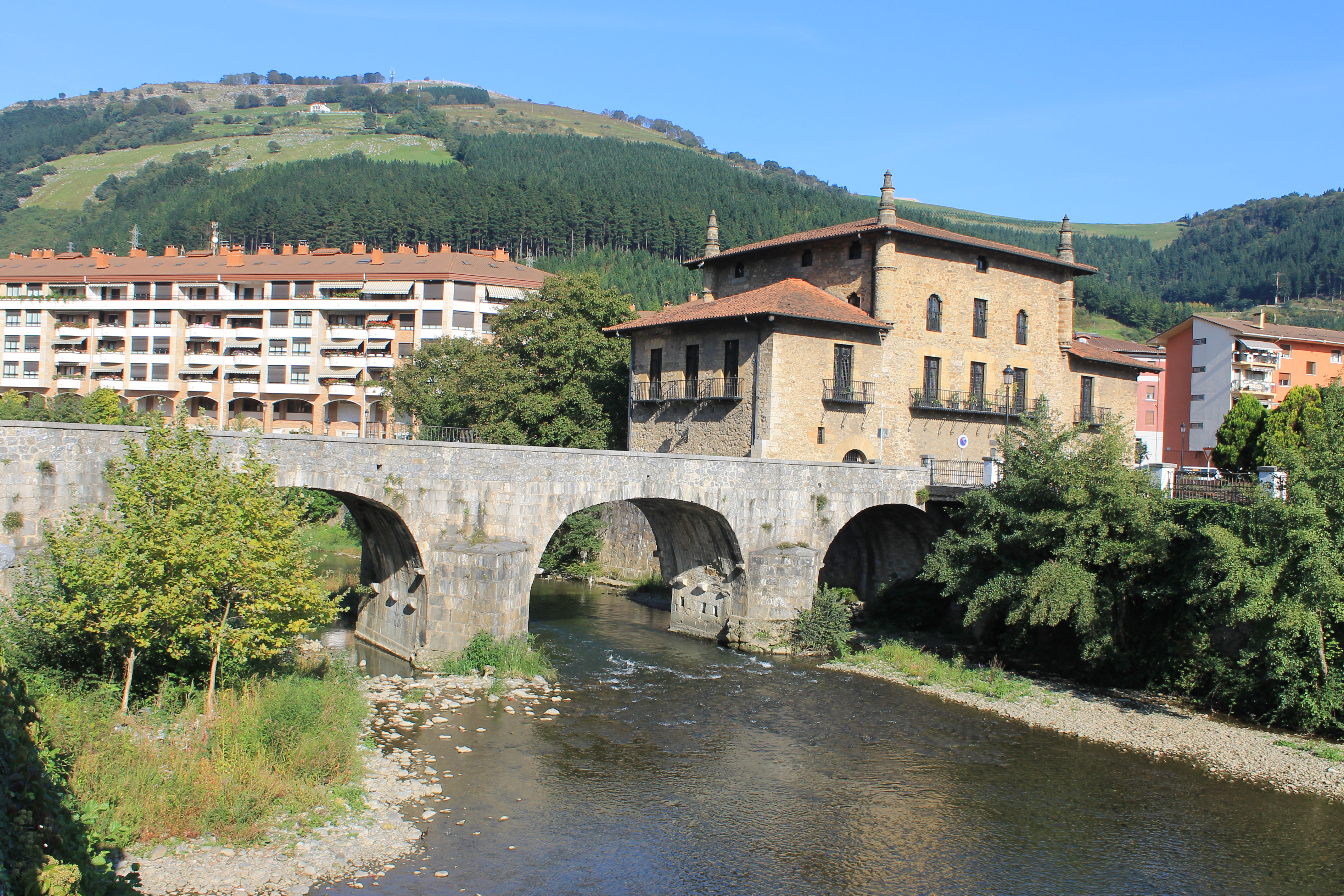 Puente viejo sobre el río Urola. Comunica ambos lados de Azpeitia.